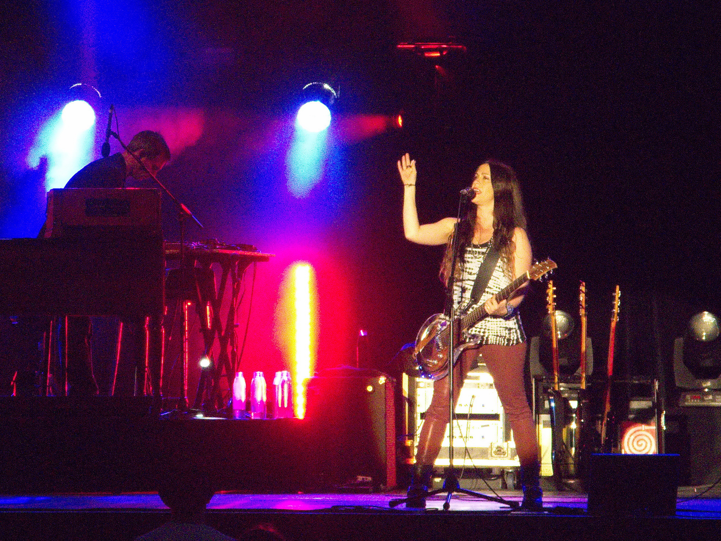 Alanis Morissette, Livet at sunset, Dolder Eisbahn in Zürich (Switzerland)